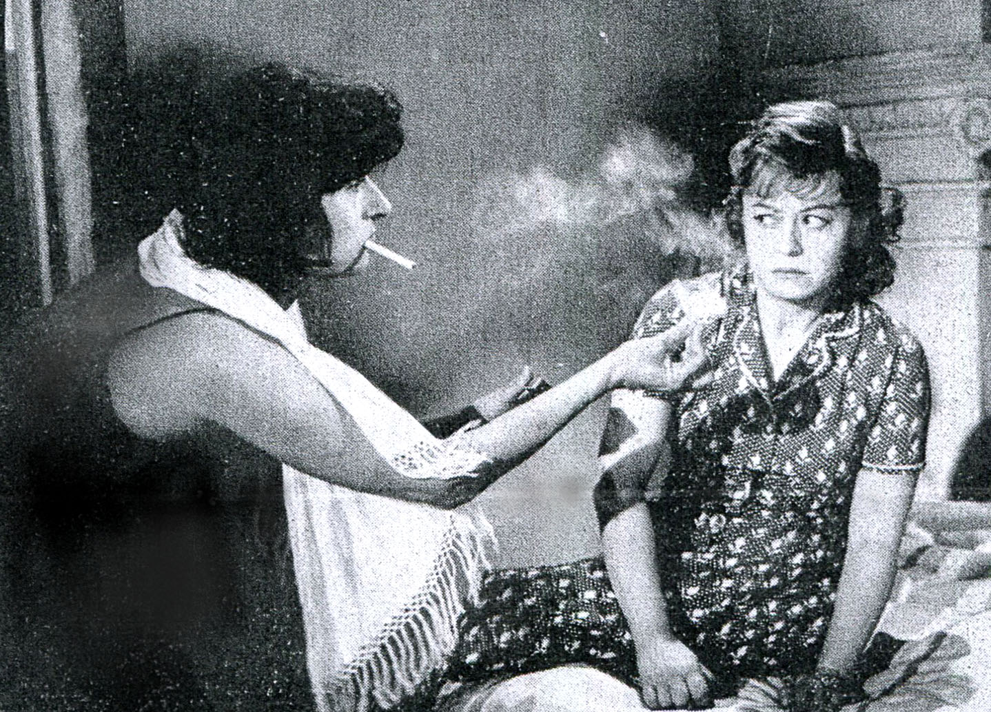 Fotogramma de Nella città l'inferno, regia di Renato Castellani, produz Riama film (Giuseppe Amato), Roma 1959. Attrici Anna Magnani e Giulietta Masina